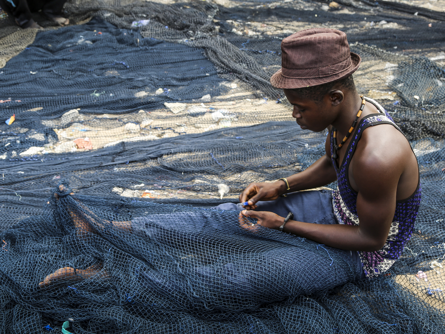 Pêcheur traditionnel réparant son filet, Dakar, Tonghor, Sénégal This is an image of "African people at work" from Senegal